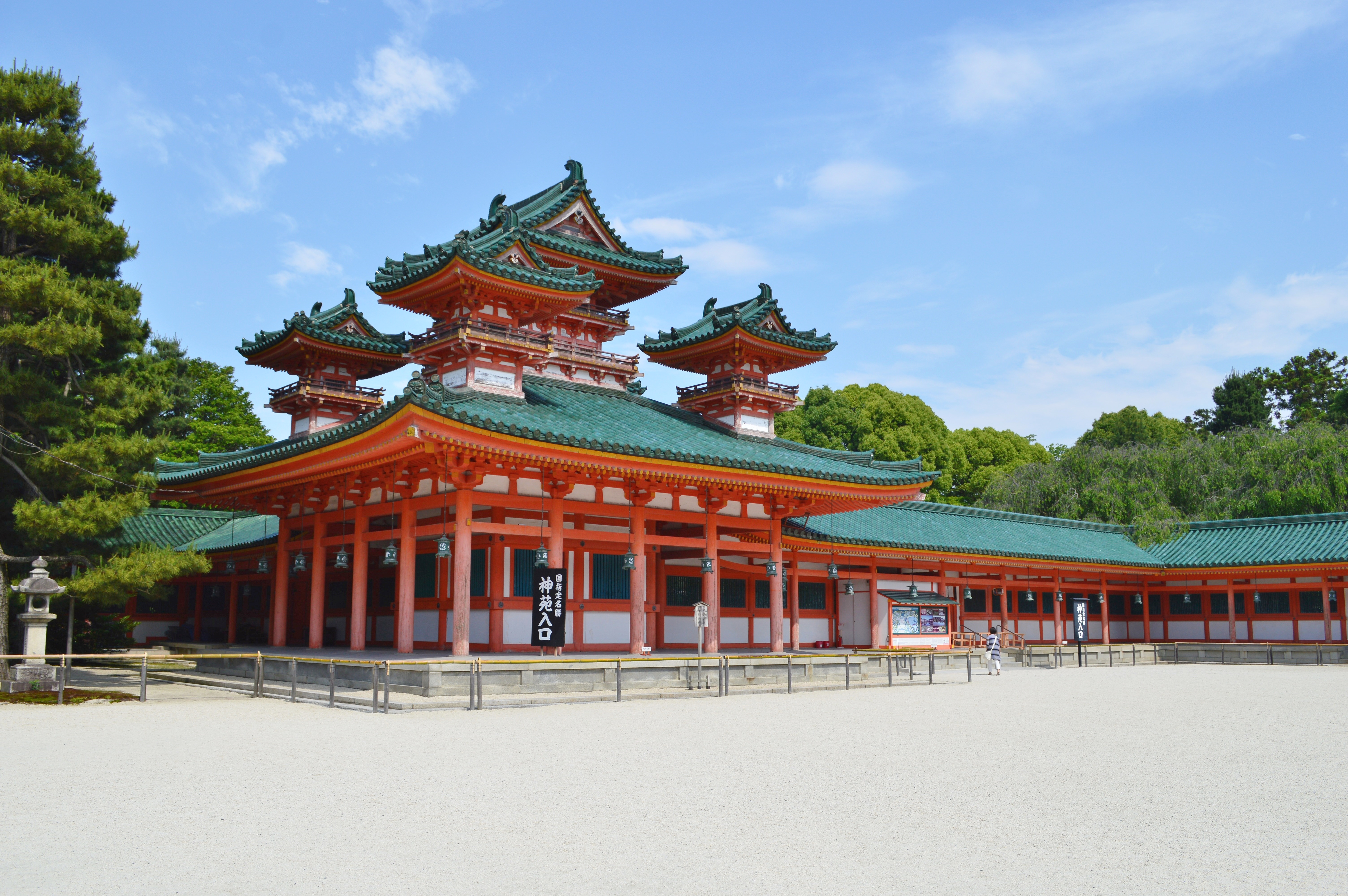 平安神宮 白虎楼